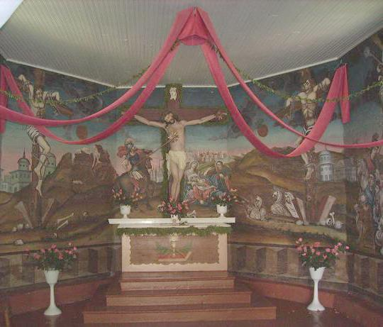 18-oji stotis – „Jėzus kenčia ir miršta ant kryžiaus“